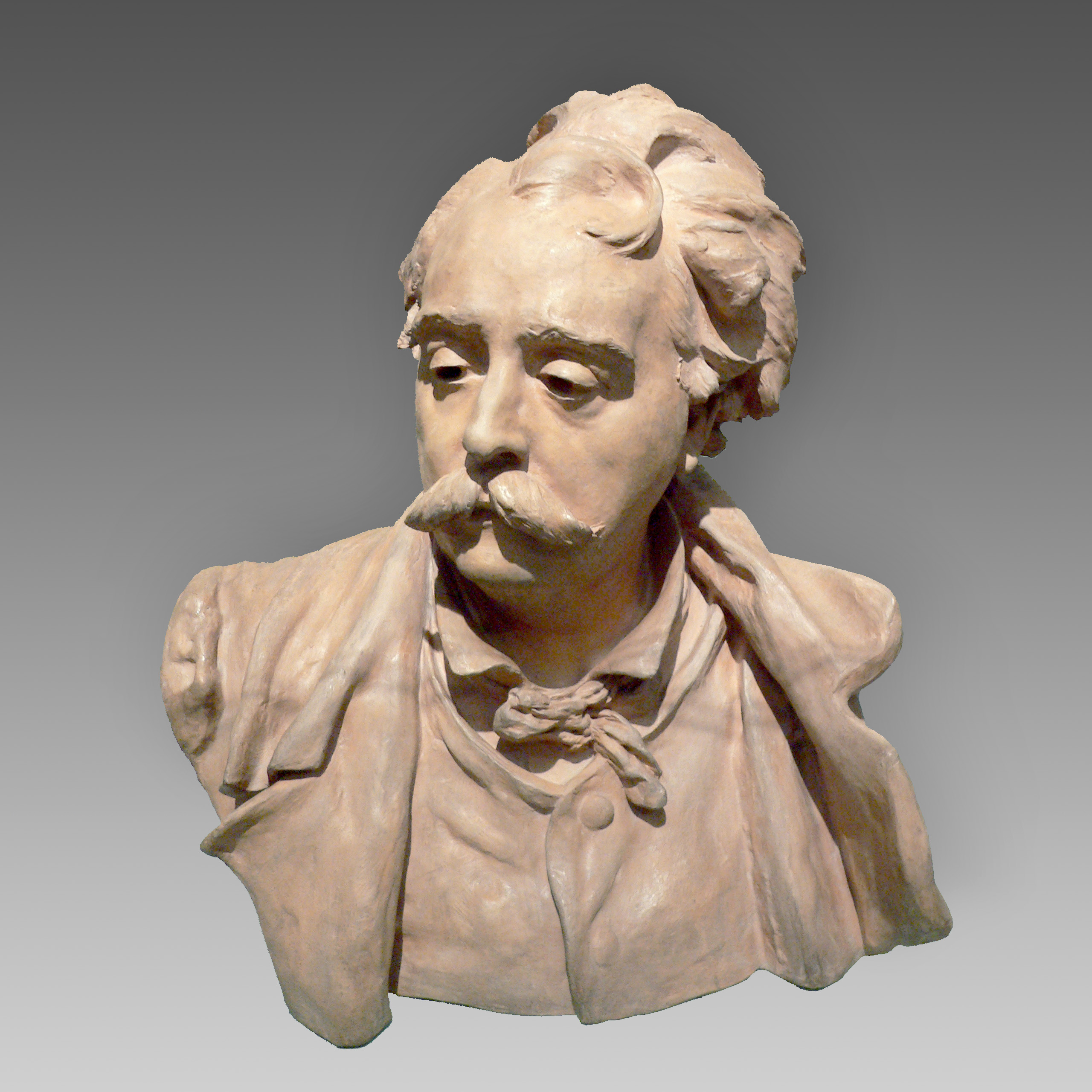 Auguste Rodin: Bust of Albert-Ernest Carrier-Belleuse, 1882, terra cotta. See also Image:Rodin Carrie-Belleuse p1070141.jpg